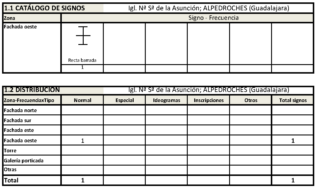 Igl. de Nª Sª de la Asunción, ALPEDROCHES (Guadalajara), España. Románica s XIII. Catálogo de marcas de cantero.